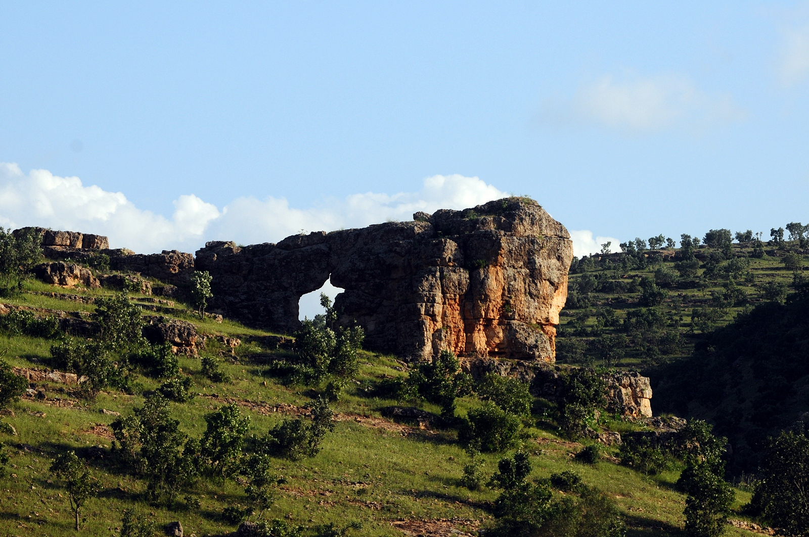 Kurdî: Gundekî stewrê